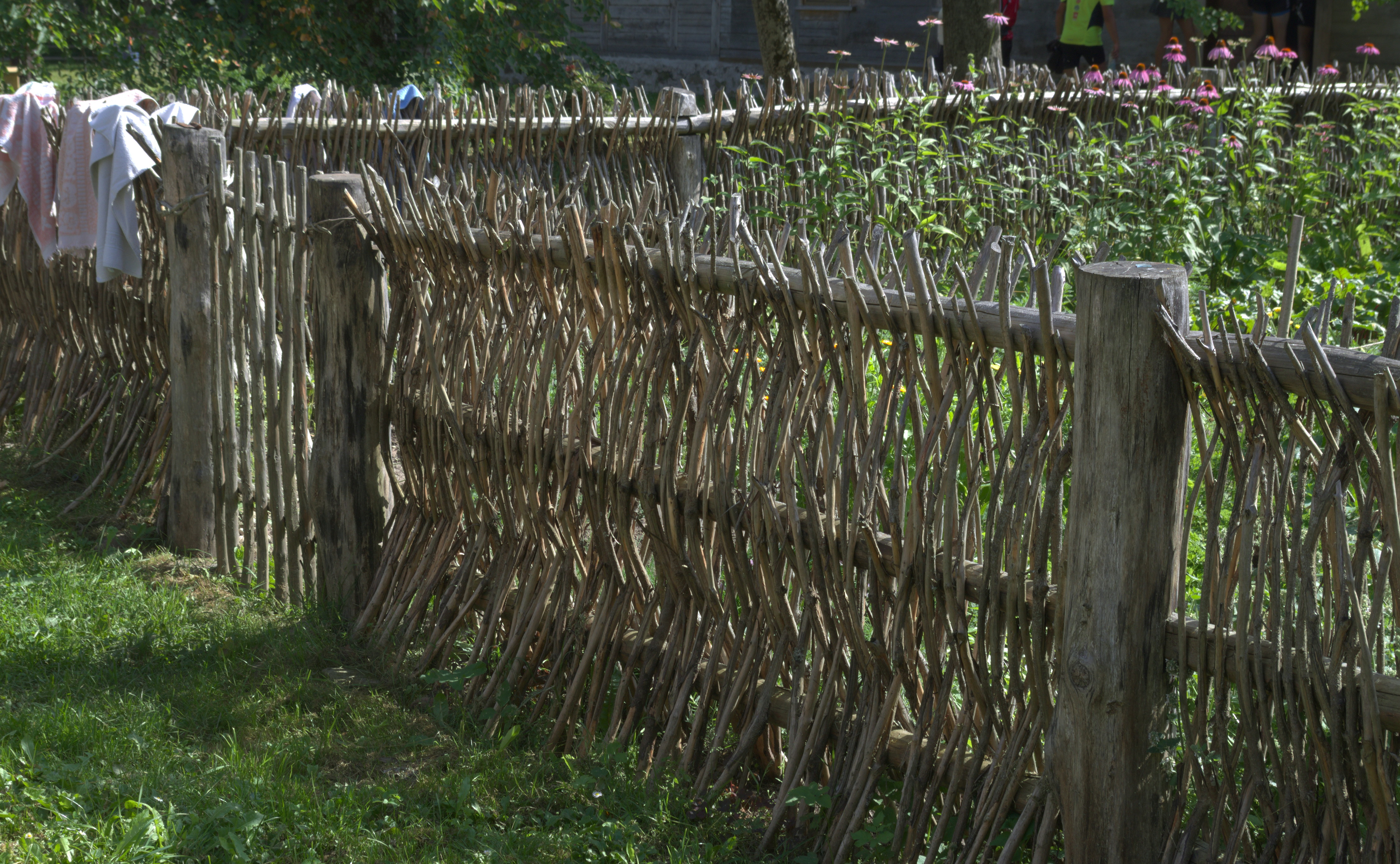 Kubeles (Kubalu) skola, Dundagas pagasts